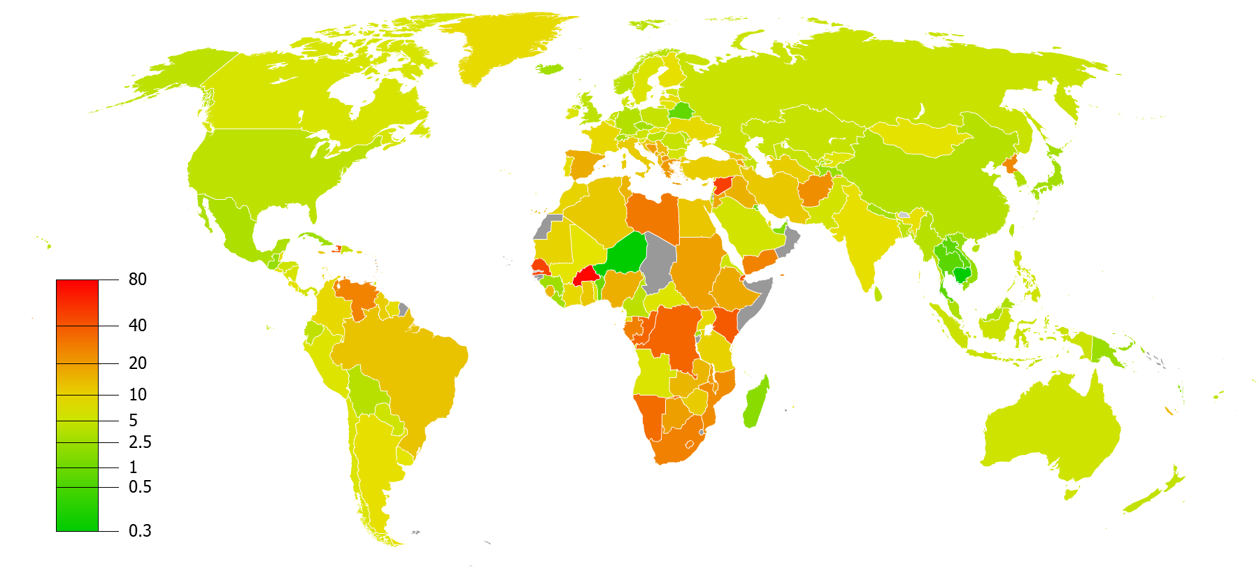 CIAFACTBOOKによる国別失業率